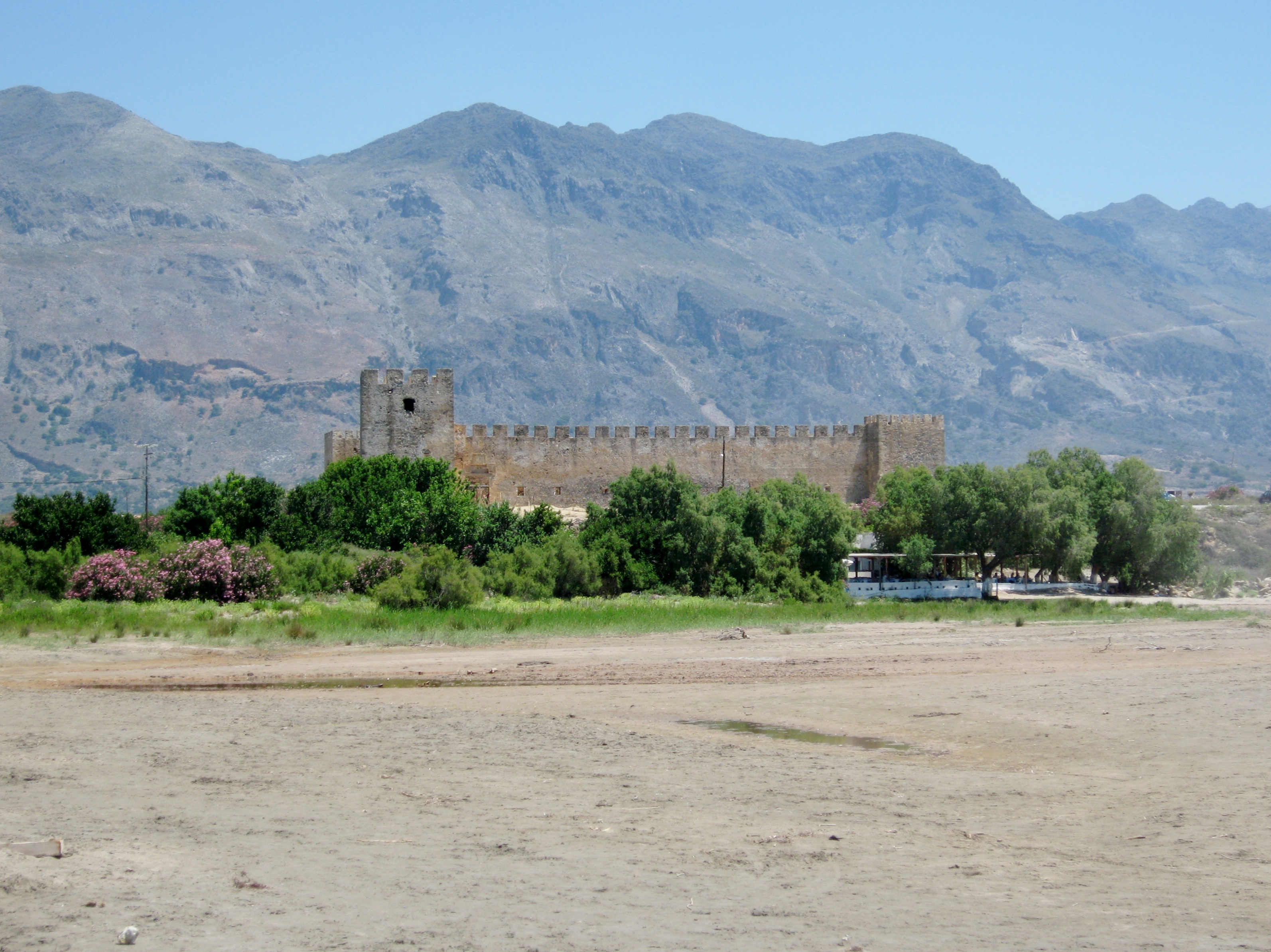 Kastell von Frangokastello, Gemeinde Sfakia, Regionalbezirk Chania, Kreta, Griechenland